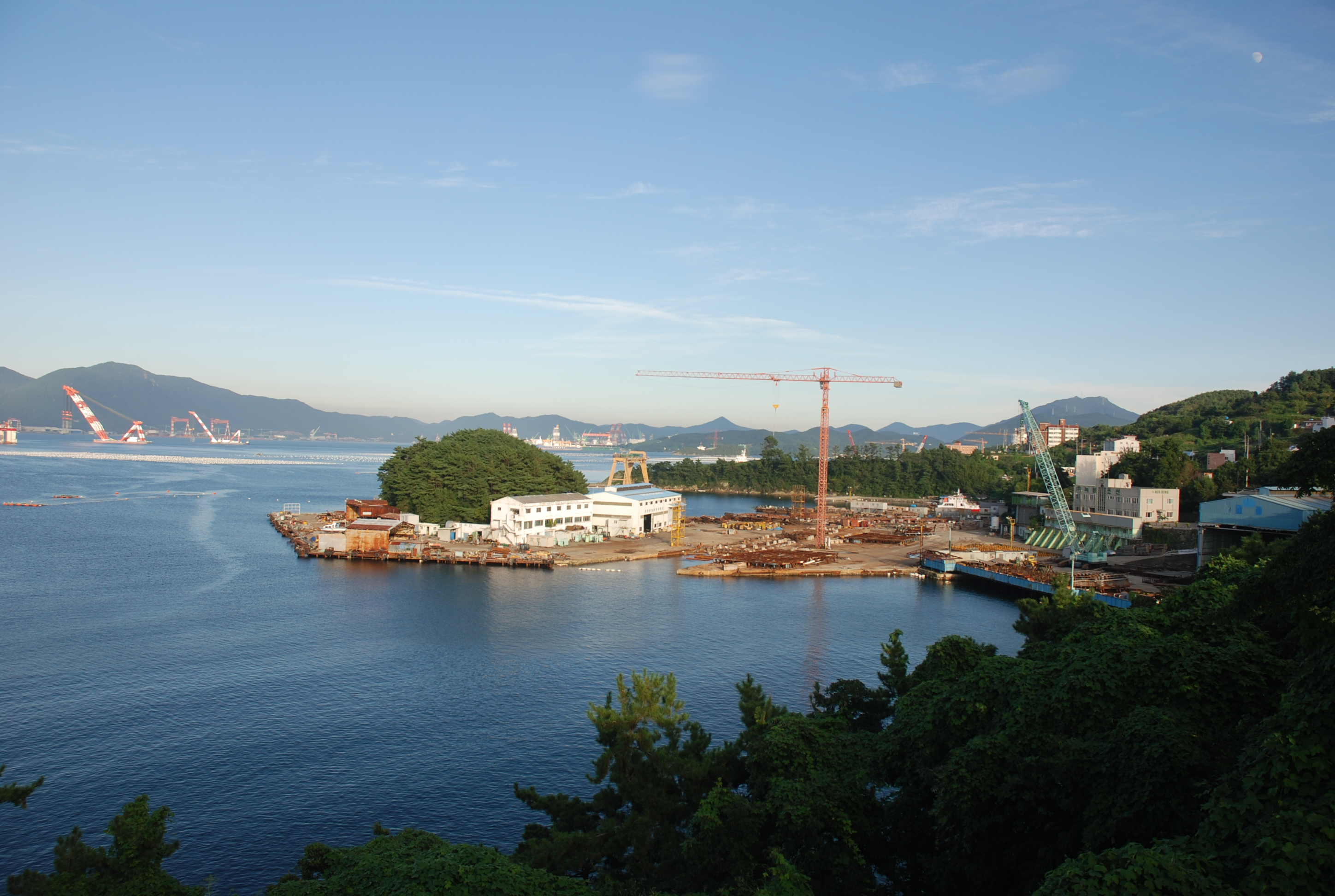 가조연륙교에서 바라 본 삼호조선소